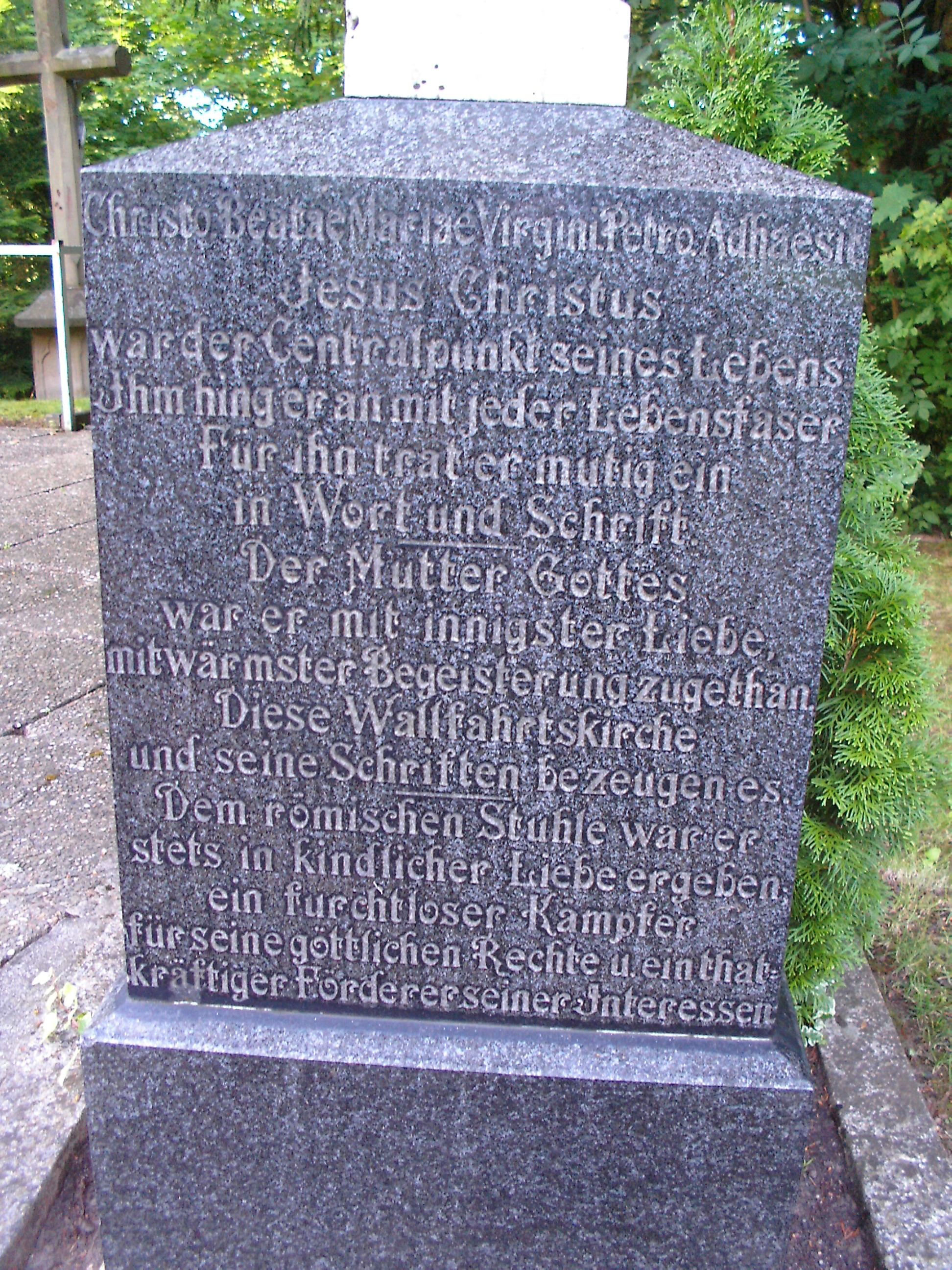 Grabinschrift Dr. Philipp Hammer, Wolfstein